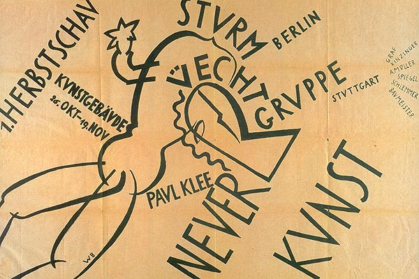 Willi Baumeister: Plakat, Üecht-Gruppe, Stuttgart 1919, 49,8 x 79 cm